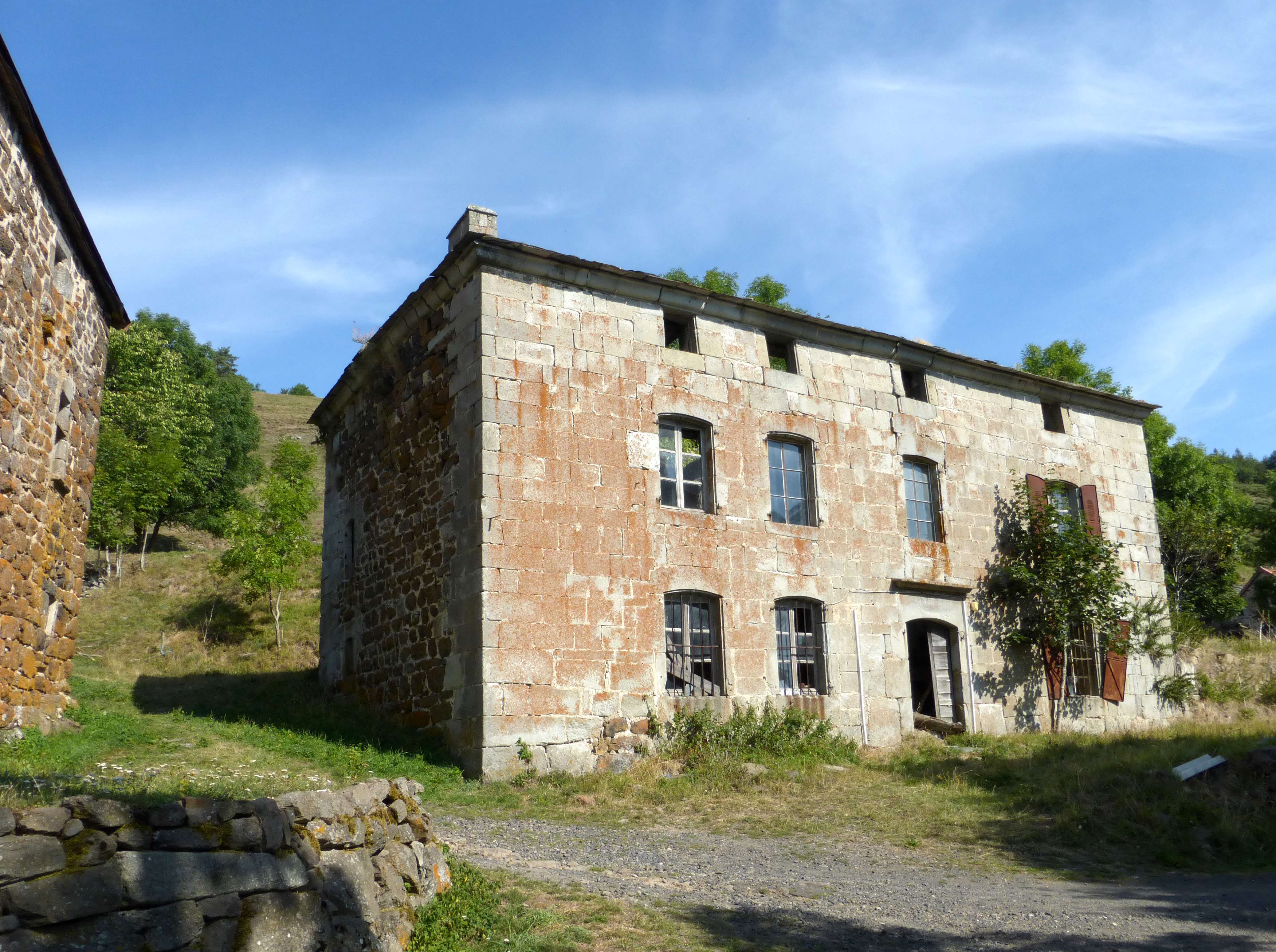 La Maison Forte de l'Herm, résidence des Seigneurs de Chambarlhac. Saint-Clément (Ardèche). Août 2017